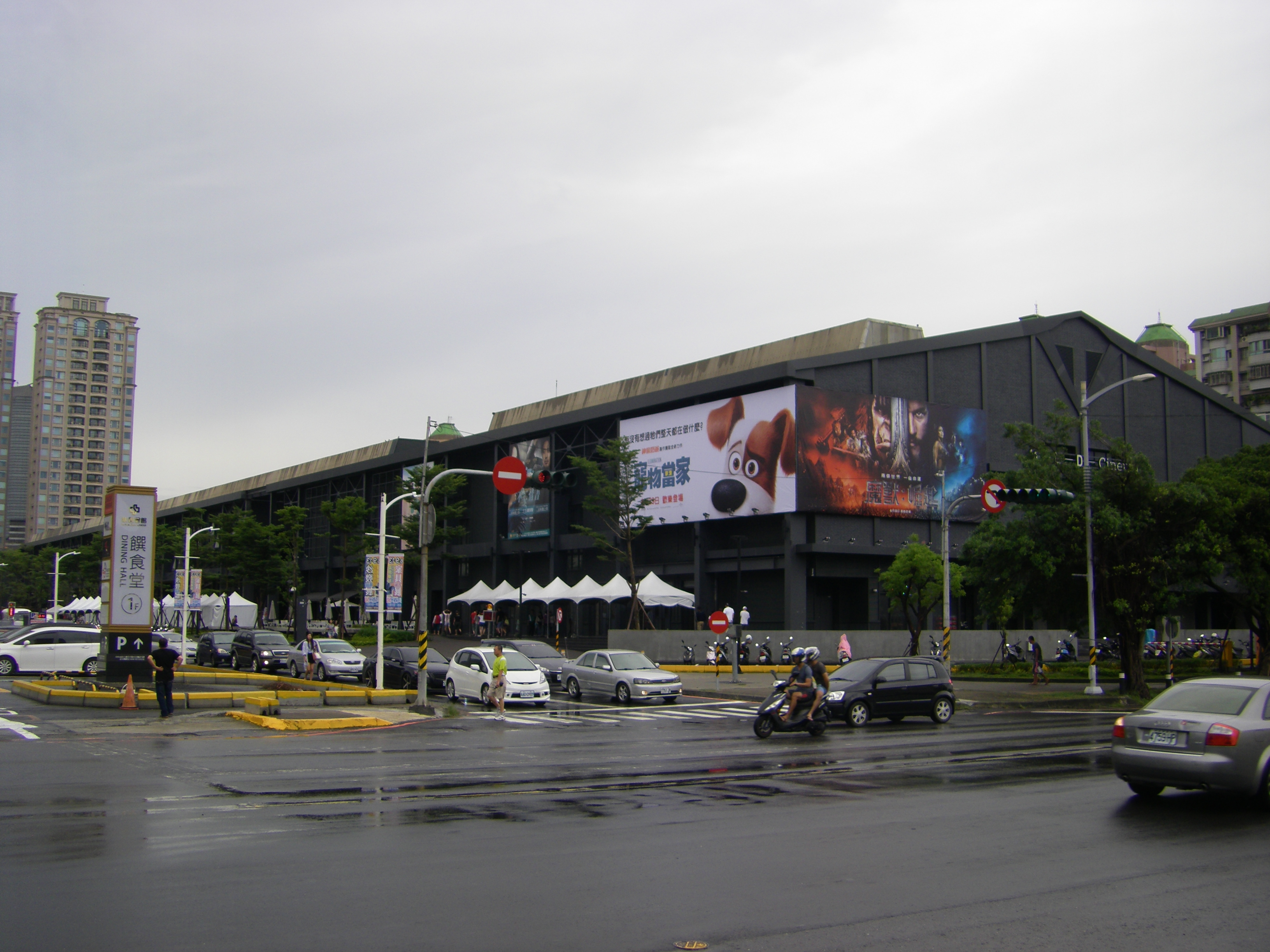 中文（台灣）: 位於高雄市前鎮區的MLD台鋁生活商場